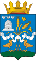 Герб Кирсановского района (полный вариант), Тамбовская область